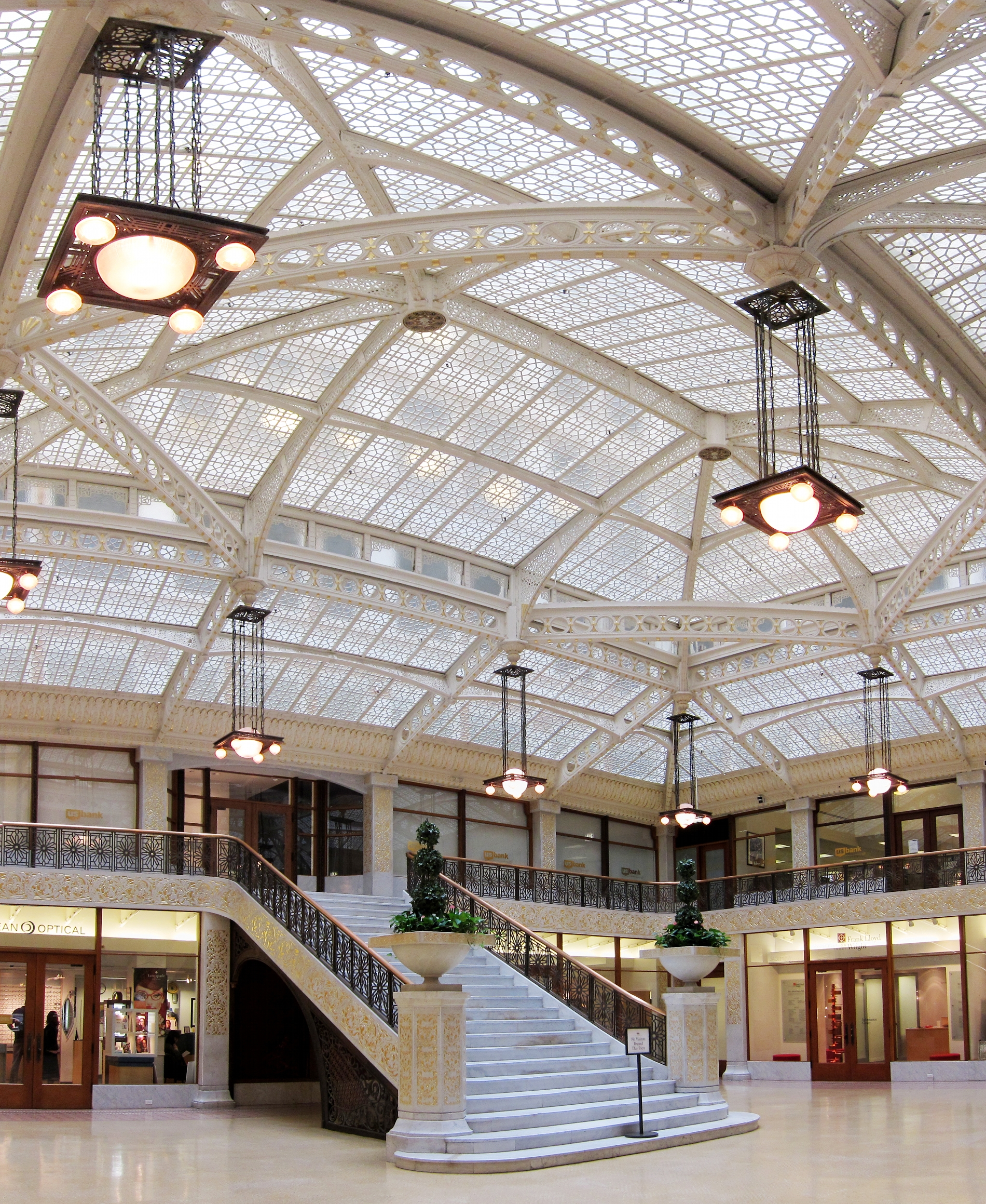 Le hall d'entrée du Rookery Building à Chicago.